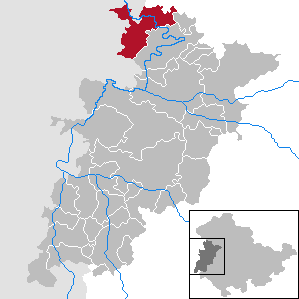 Treffurt in Thuringia - Wartburgkreis